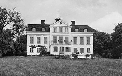 Fållökna gård, huvudbyggnad